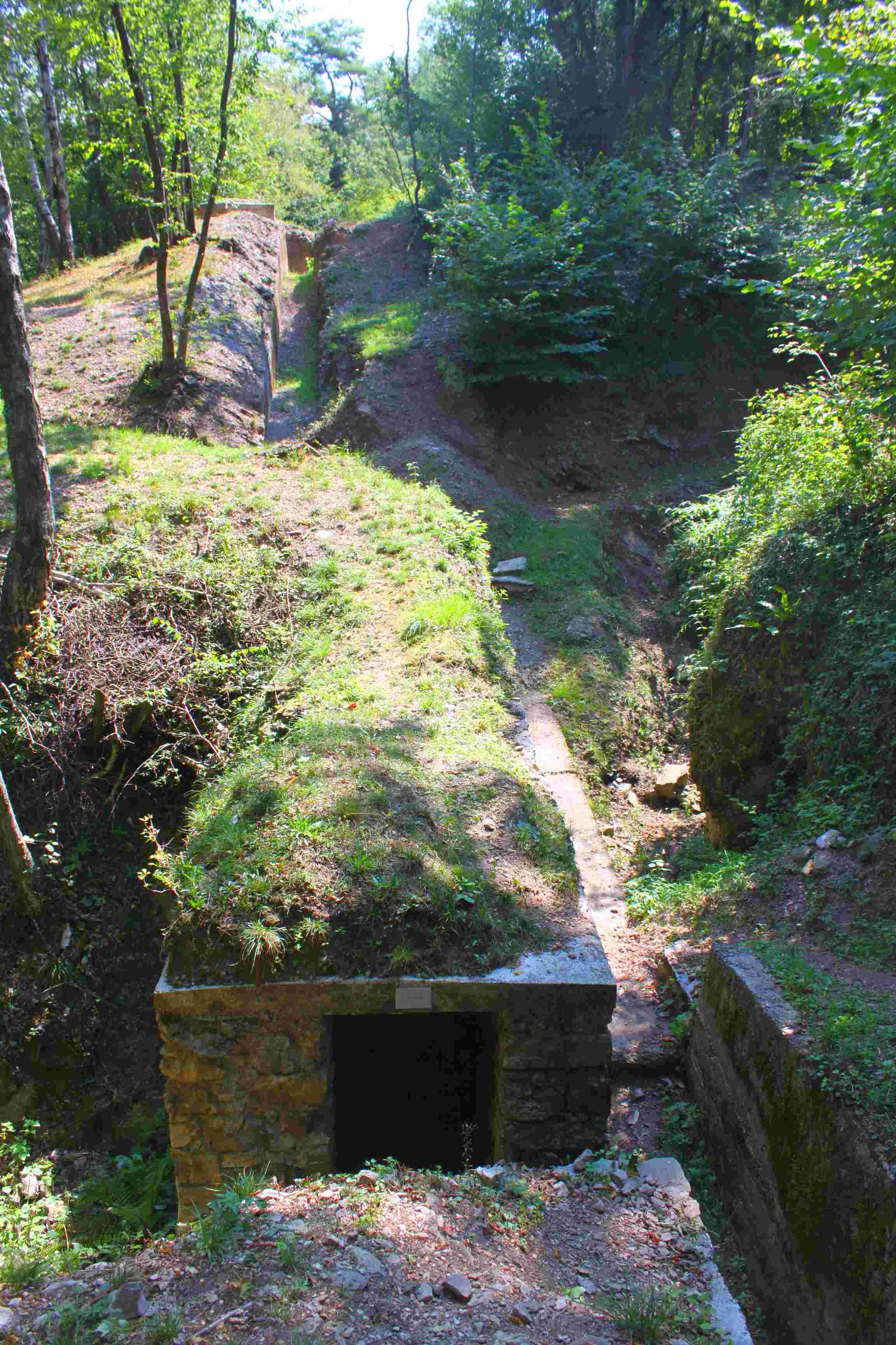 In der Nähe der Kapelle La Crocetta findet man alte Schützengräben. Sie sind während des Ersten Weltkrieges entstanden und gehörten zur Verteidigungslinie Linea Cadorna an der Italienisch - Schweizer Grenze.